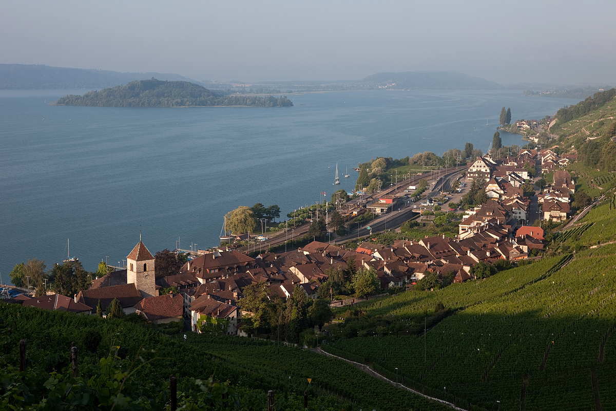 Übersichtsbild von Twann am Bielersee mit Blick zur St. Petersinsel